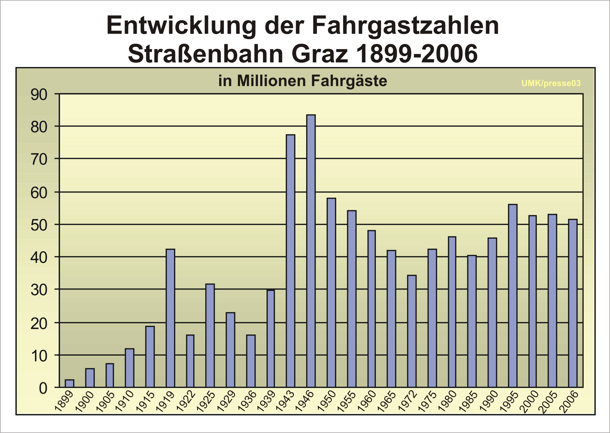 Entwicklung der Fahrgastzahlen der Straßenbahn Graz 1900-2006